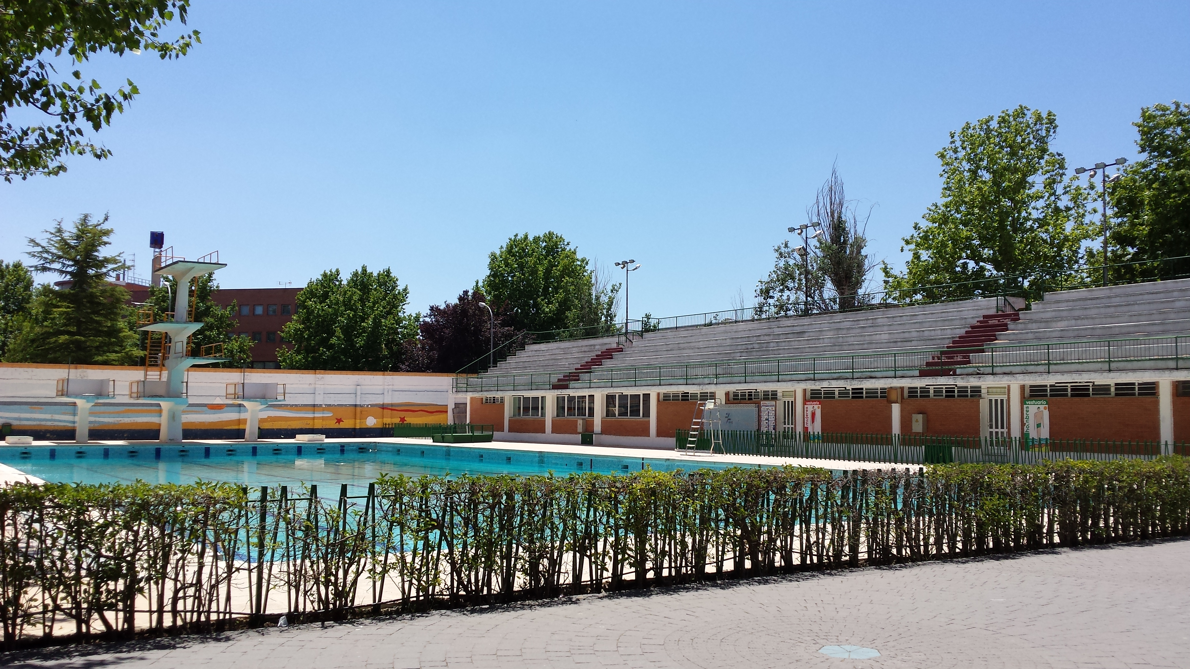 Piscina Olímpica del Complejo Deportivo Carlos Belmonte. Albacete